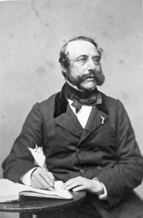 Portrait photographique d'Urbain Vitry